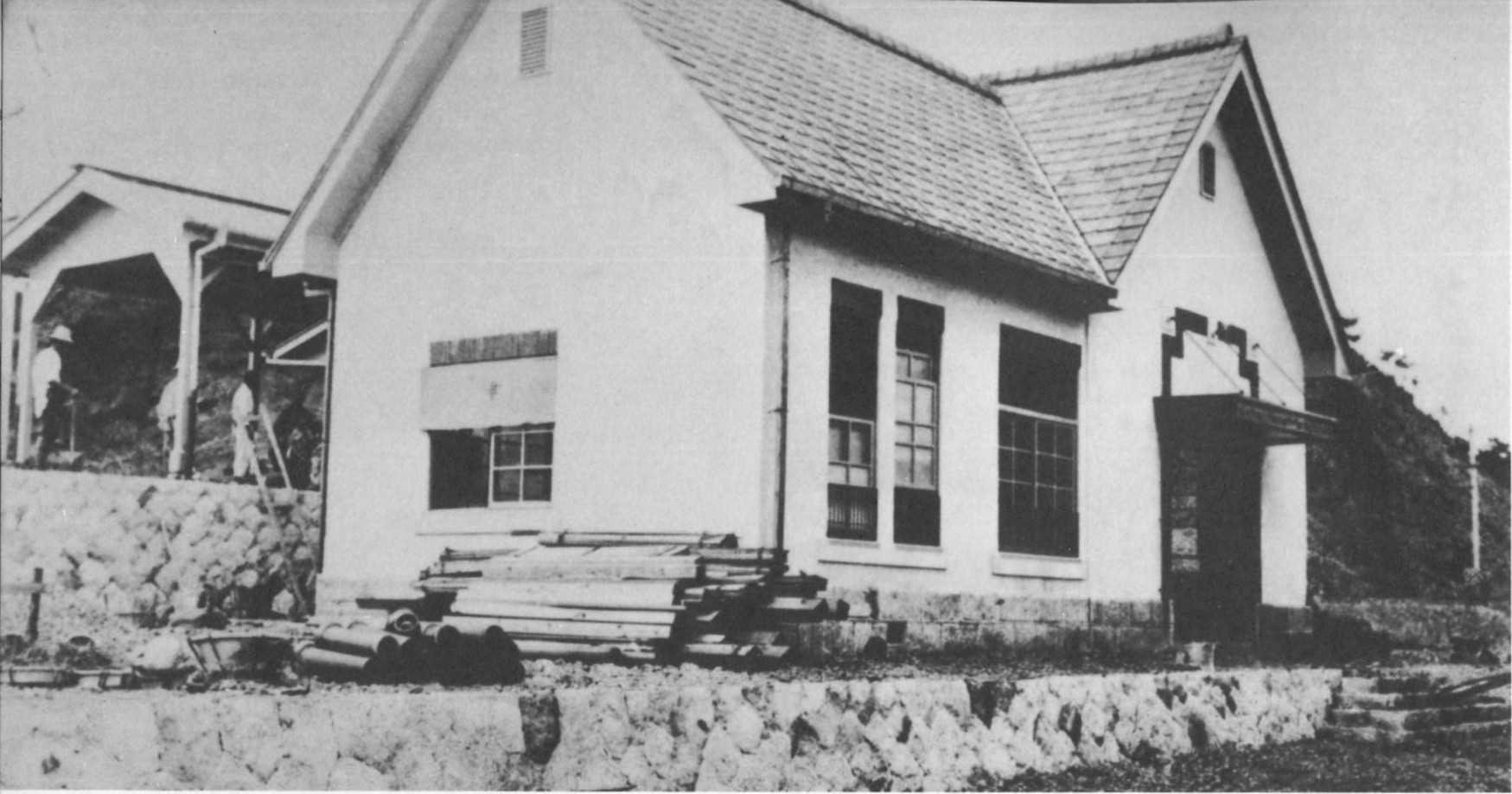 開業直前の志摩電気鉄道(現・近鉄志摩線)賢島駅。この駅舎は、現在の南口駅舎の隣に現存する。